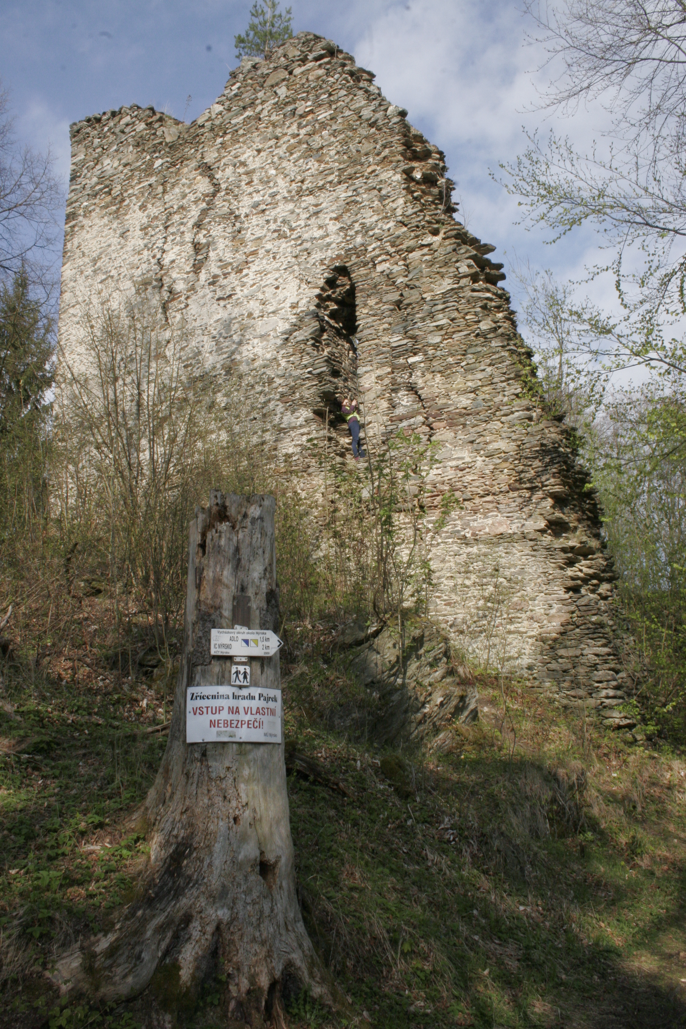 Hrad Pajrek, okres Klatovy, Česká republika.